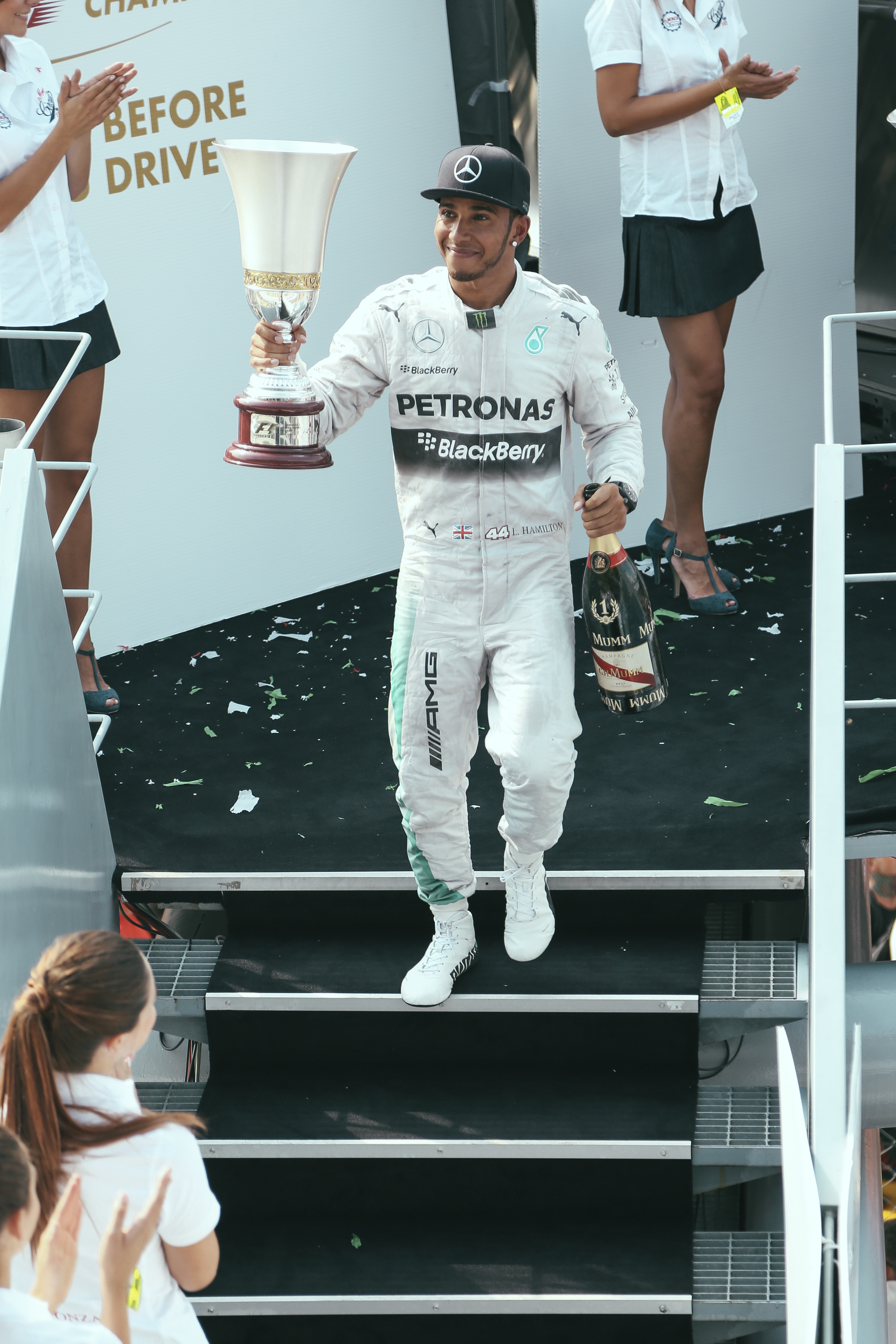 GP MONZA 2014